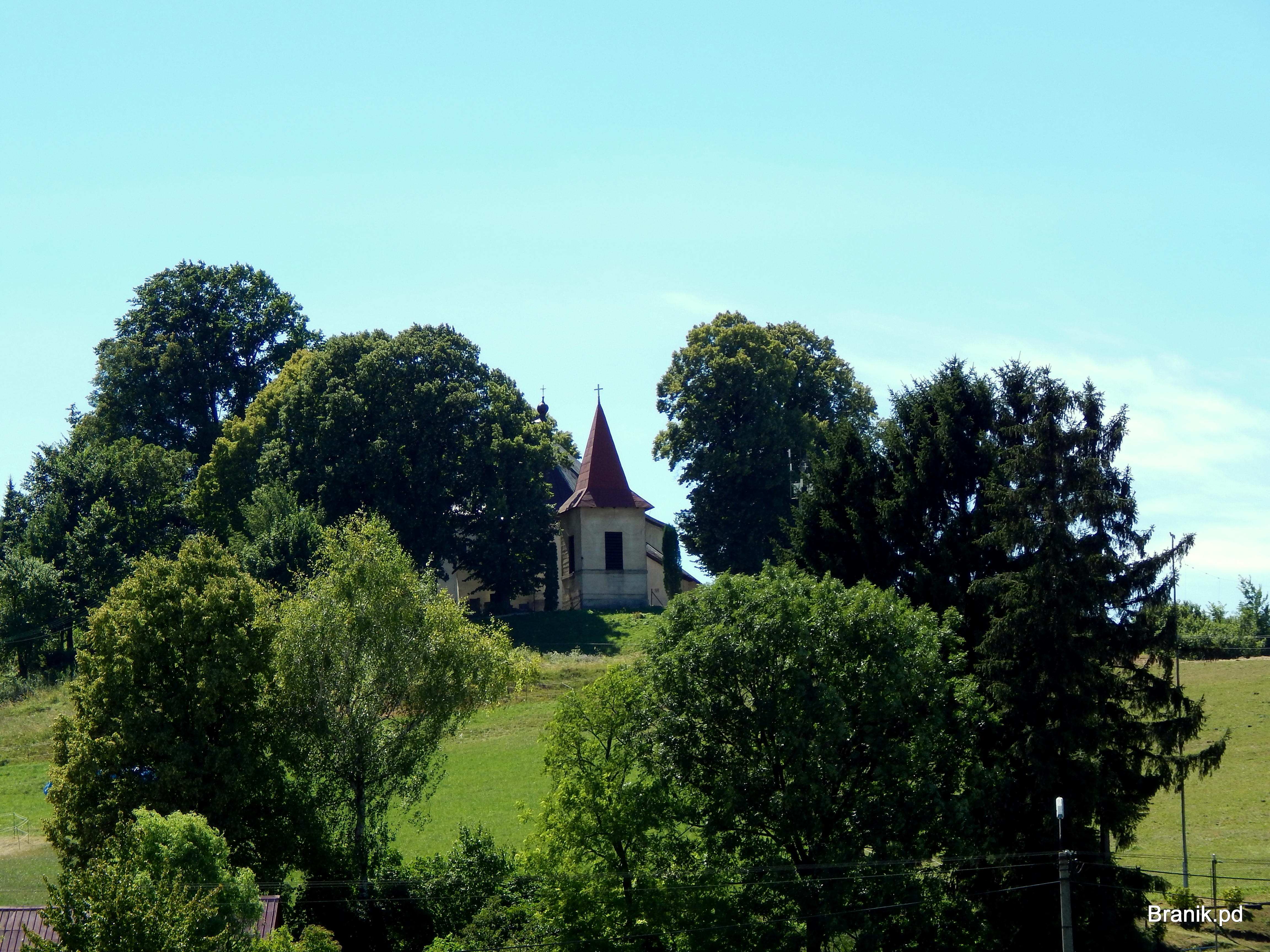 038 43 Socovce, Slovakia